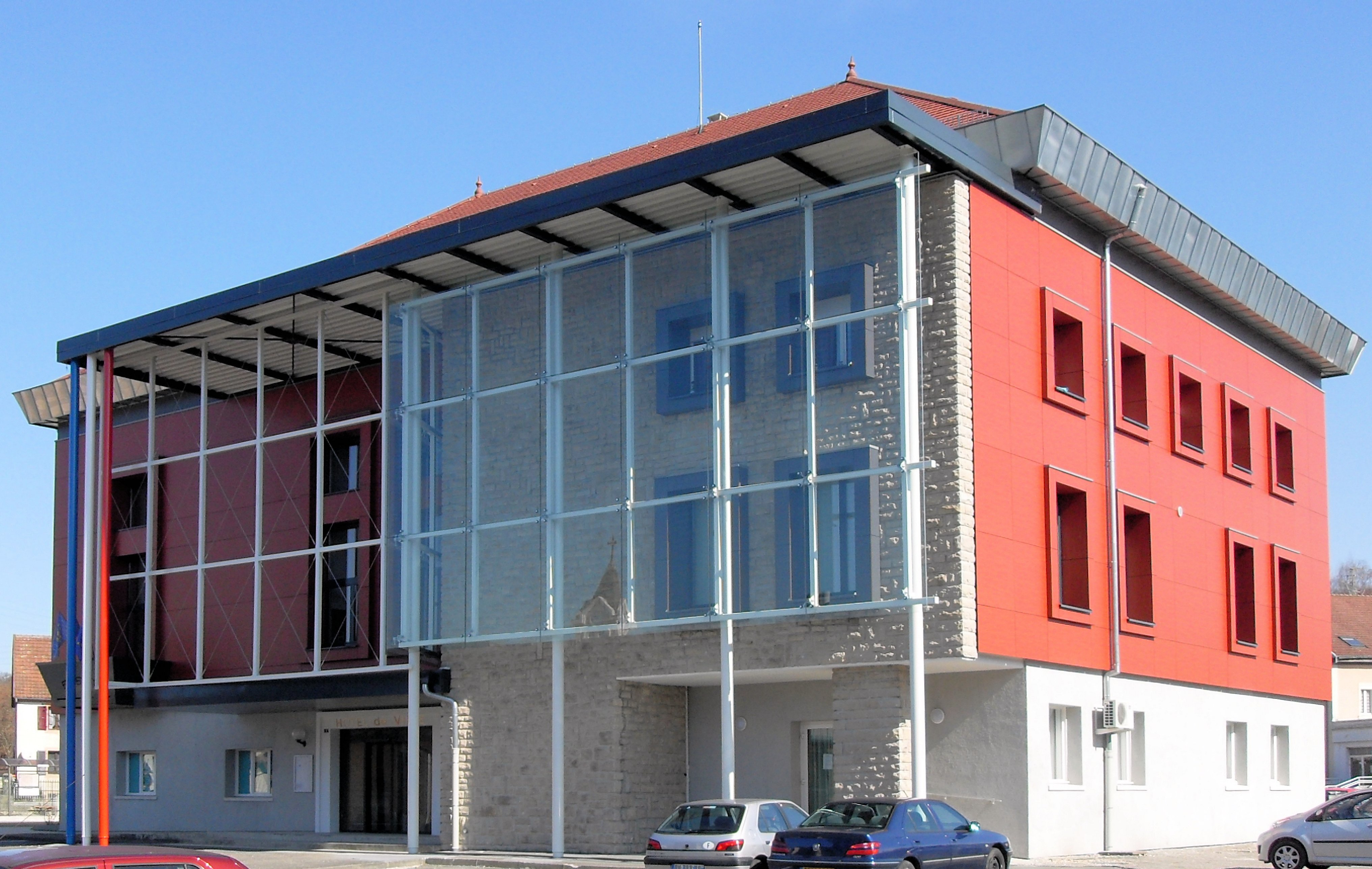 L'hôtel de ville de Fesches-le-Châtel